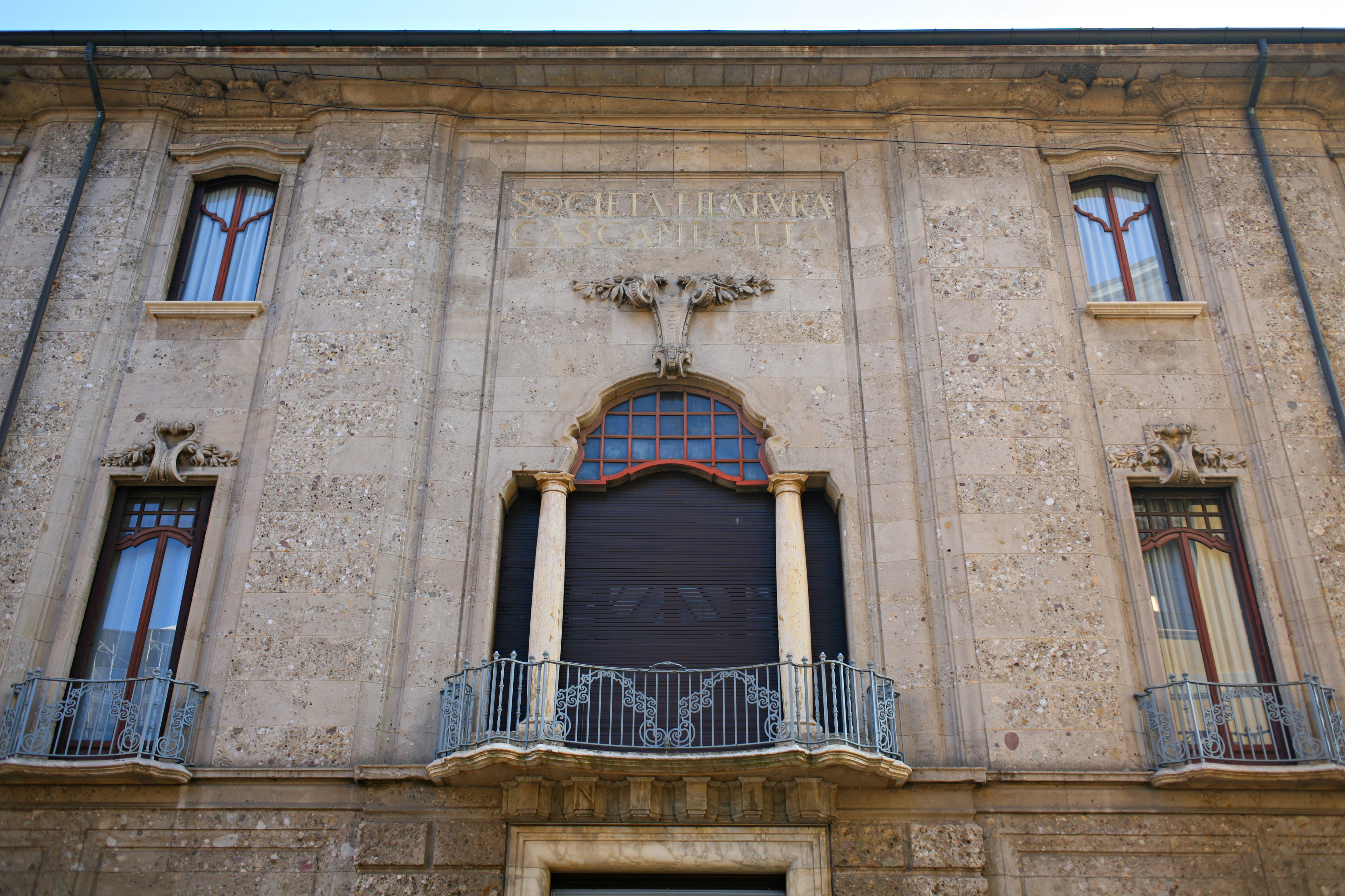 Veduta prospettica orizzontale della facciata della Sede per la Società Filatura Cascami Seta, Milano (1920-1924), arch. P. Portaluppi